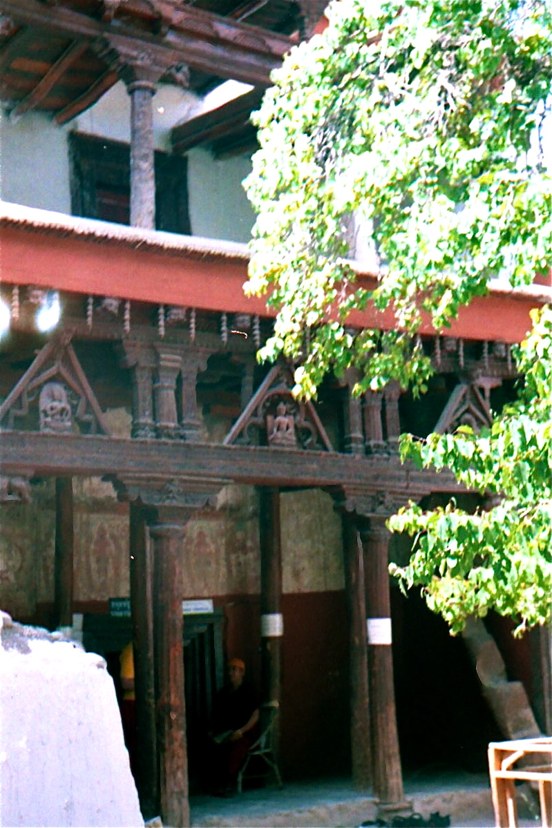 Le Sumtseg à Alchi